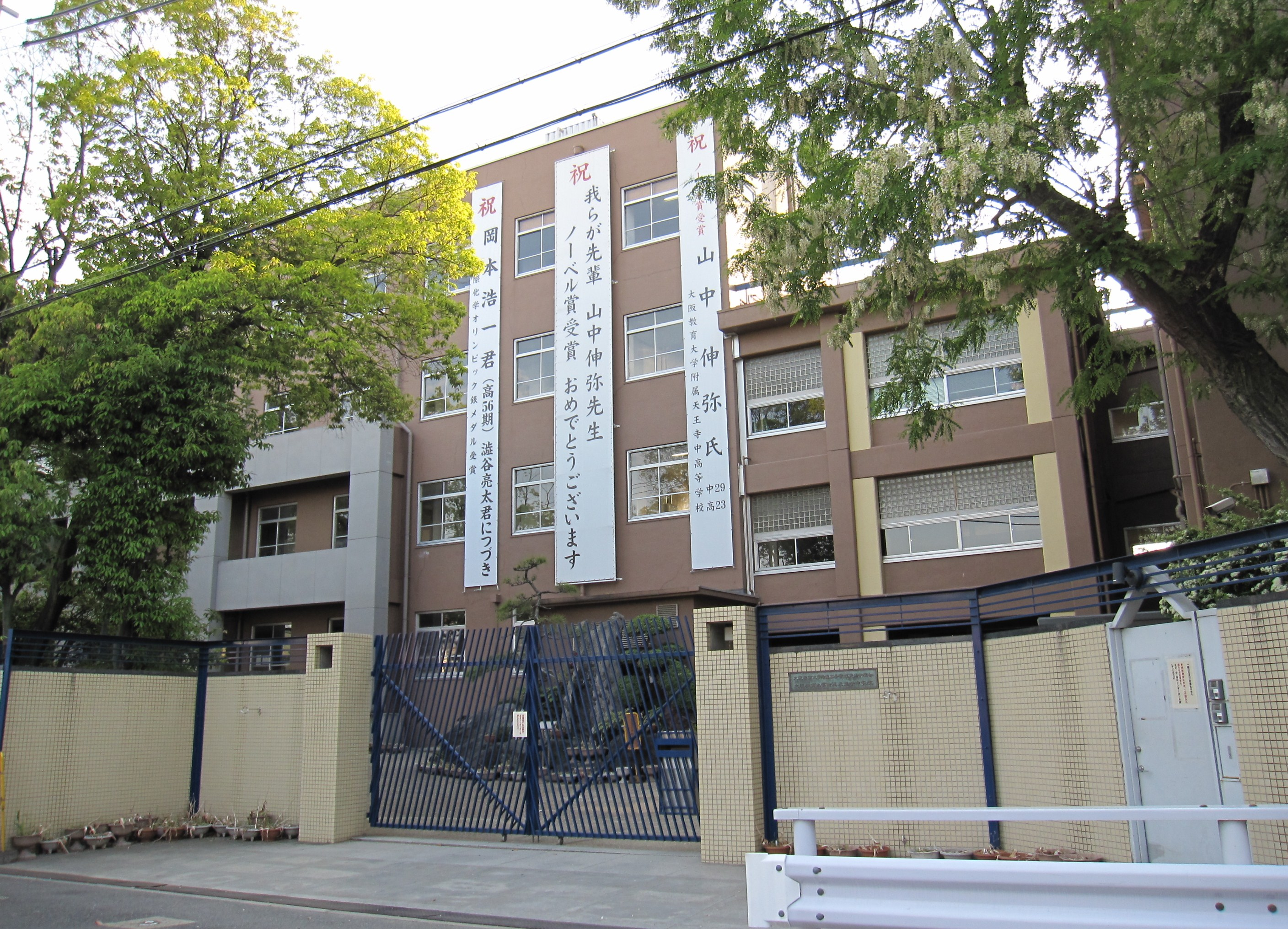 大阪教育大学附属天王寺中学校